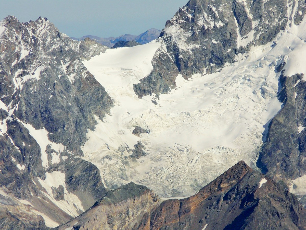 Schalijoch gegen Osten, Weisshorn, Wallis, Schweiz